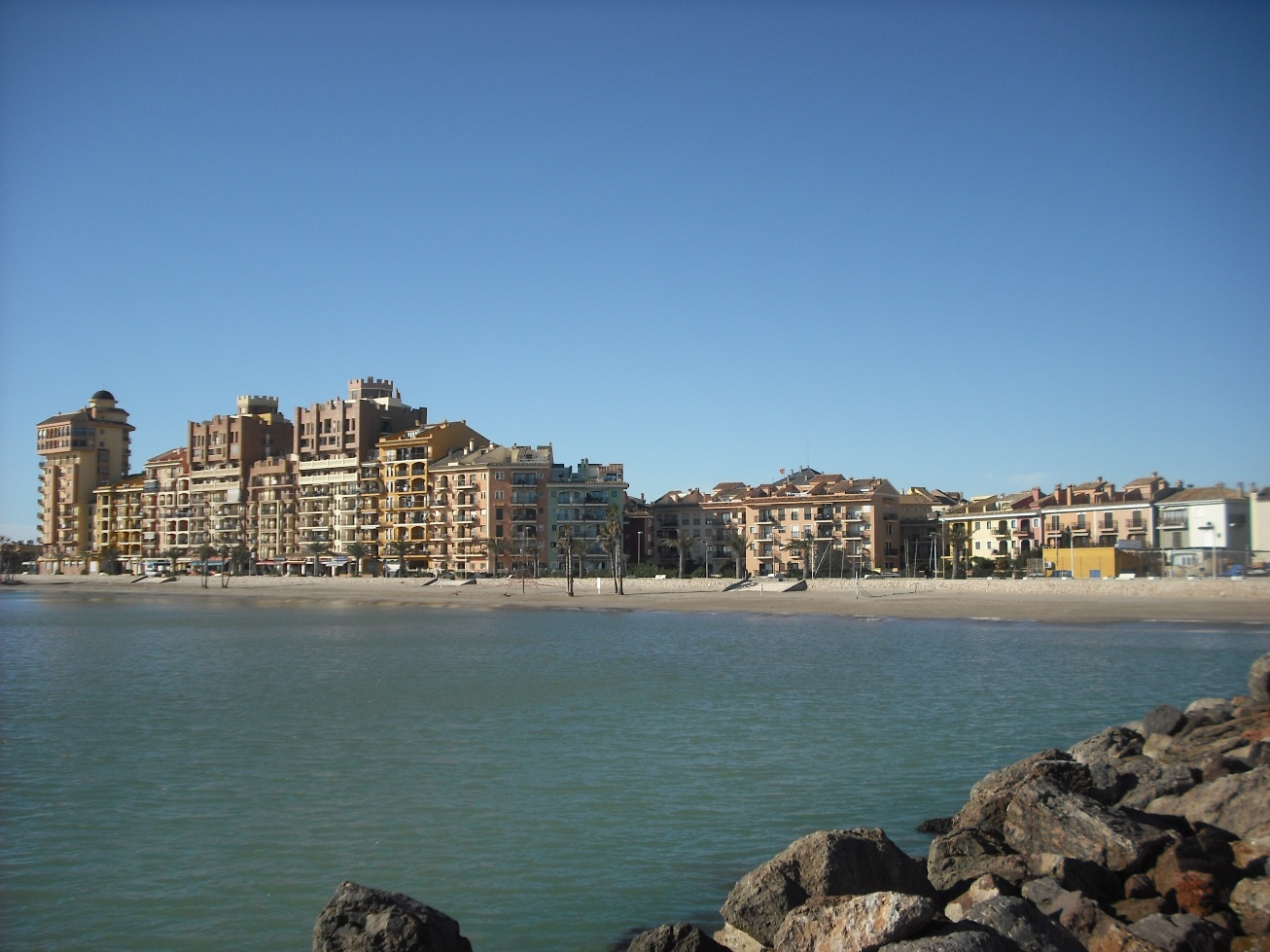 Vista de Port Saplaya (Alboraya) desde el malecón que protege la entrada al puerto.